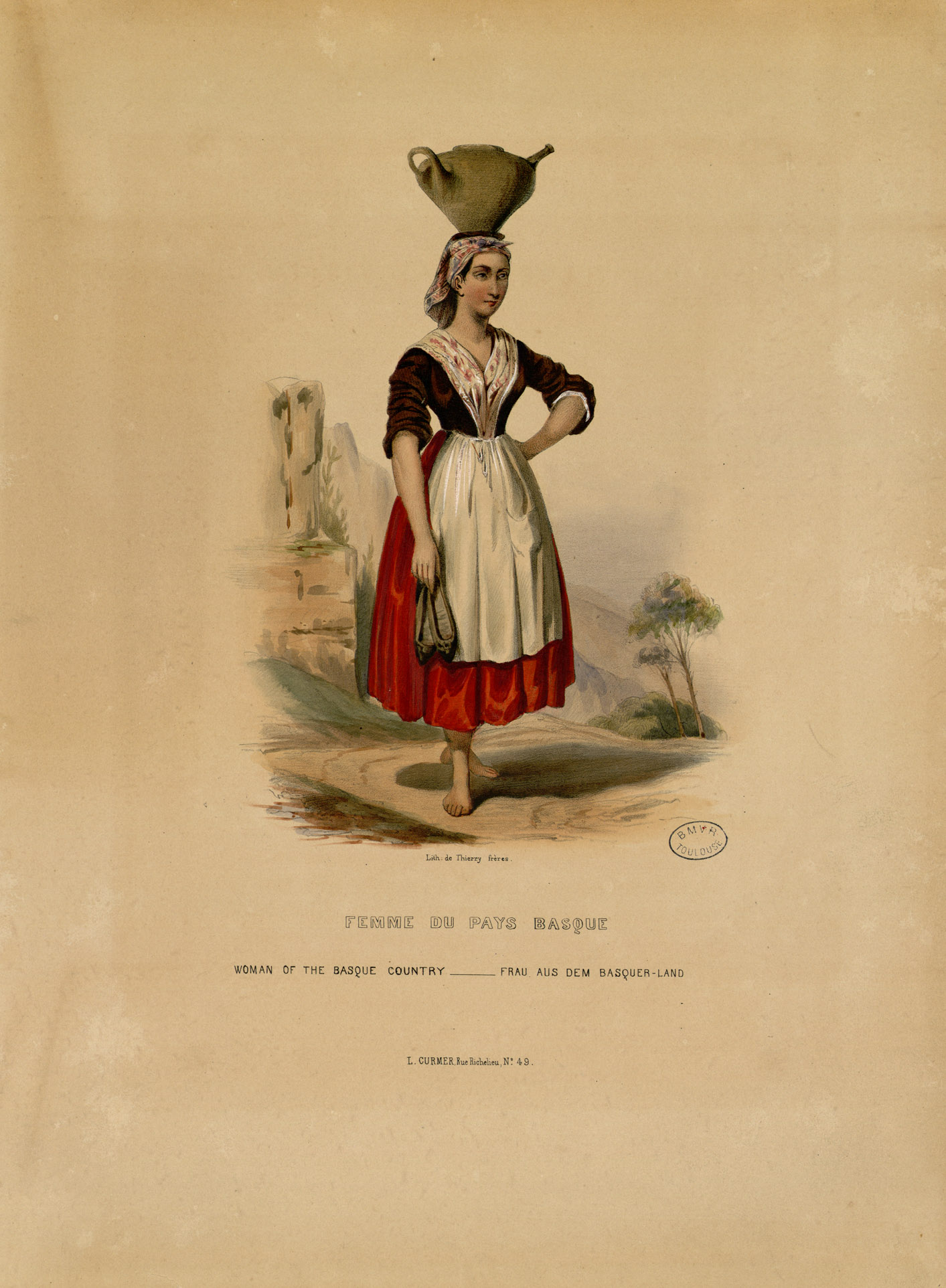 Ancely, René (1876 - 1966). Possesseur